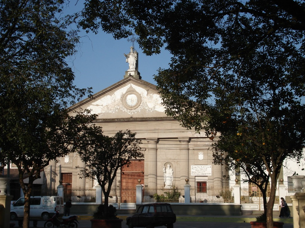 Parroquia Nuestra Señora del Cármen, Famaillá, Tucumán